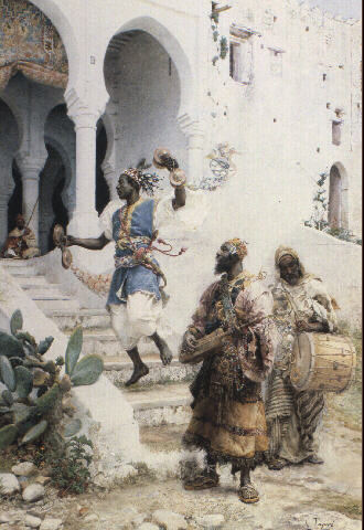 Obra de Josep Tapiró i Baró, etapa a Tànger.